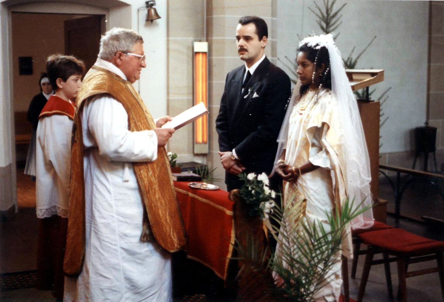 Pfarrer Raymond Arnette bei einer Trauung in Frankenthal-Mörsch